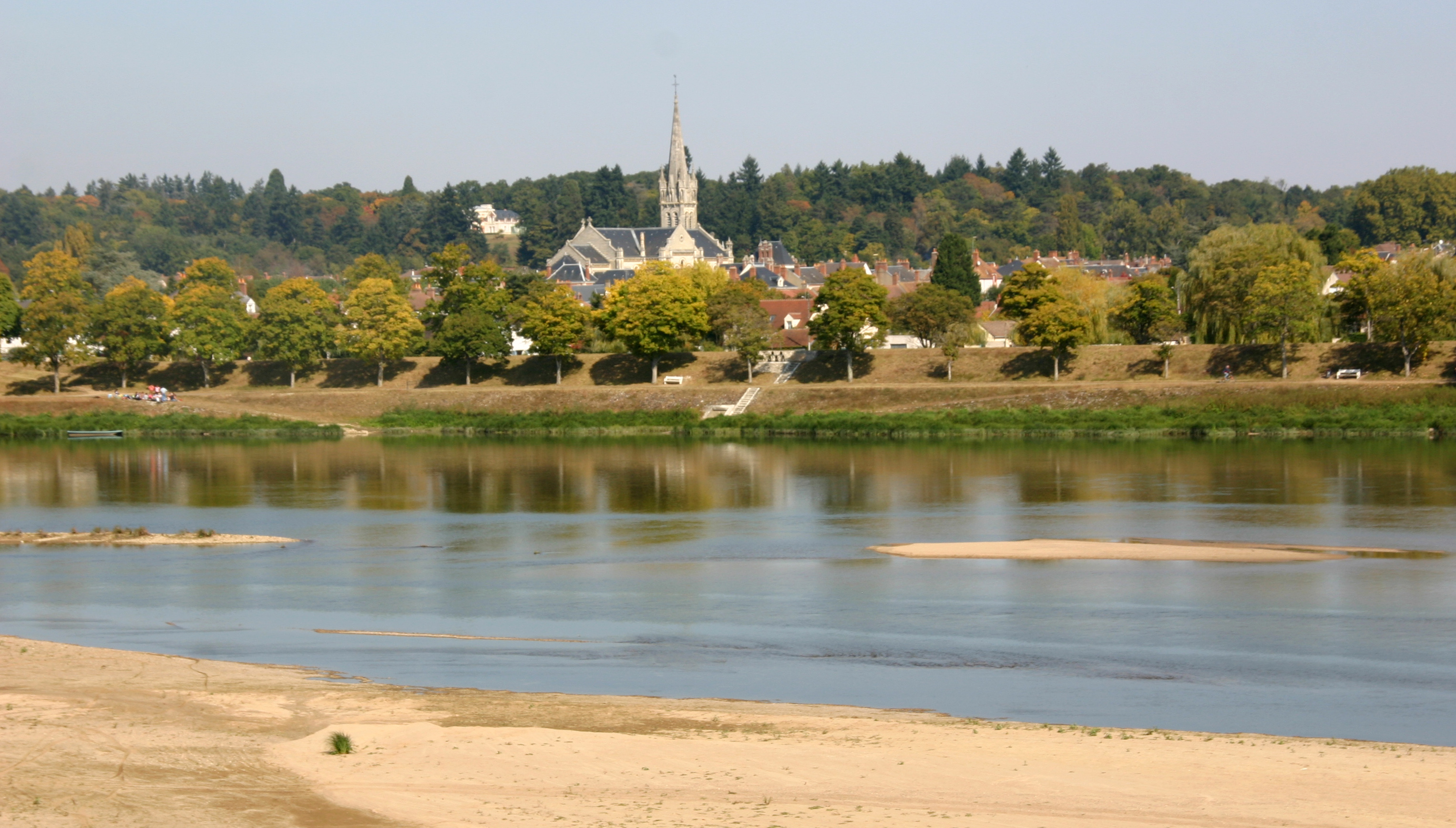 Kirche Saint-Étienne in Briare